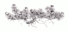 Senecio humillimus illustration [1]